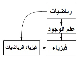 صورة لفيزياء الرياضيات